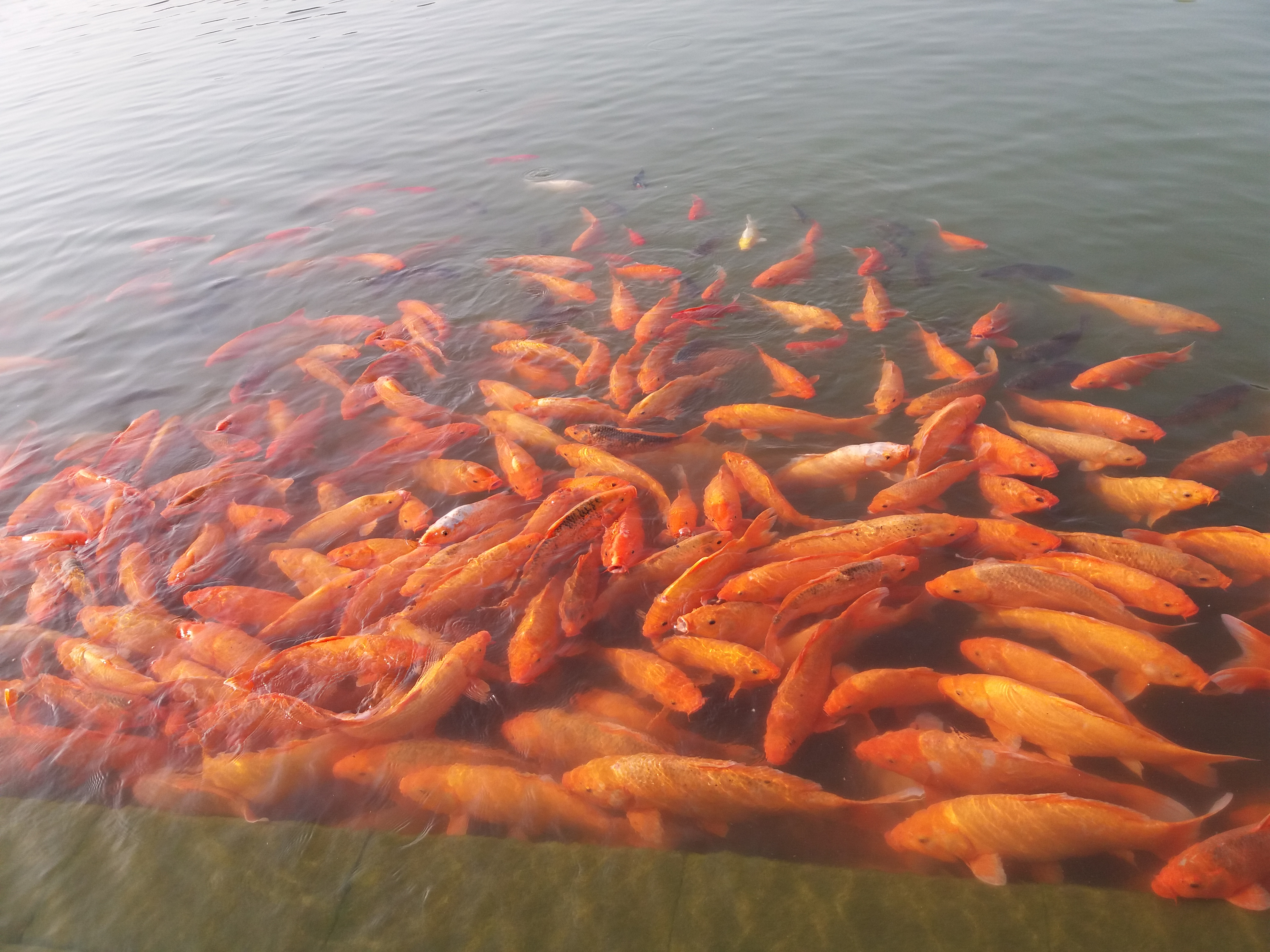 Olympic Forest Park